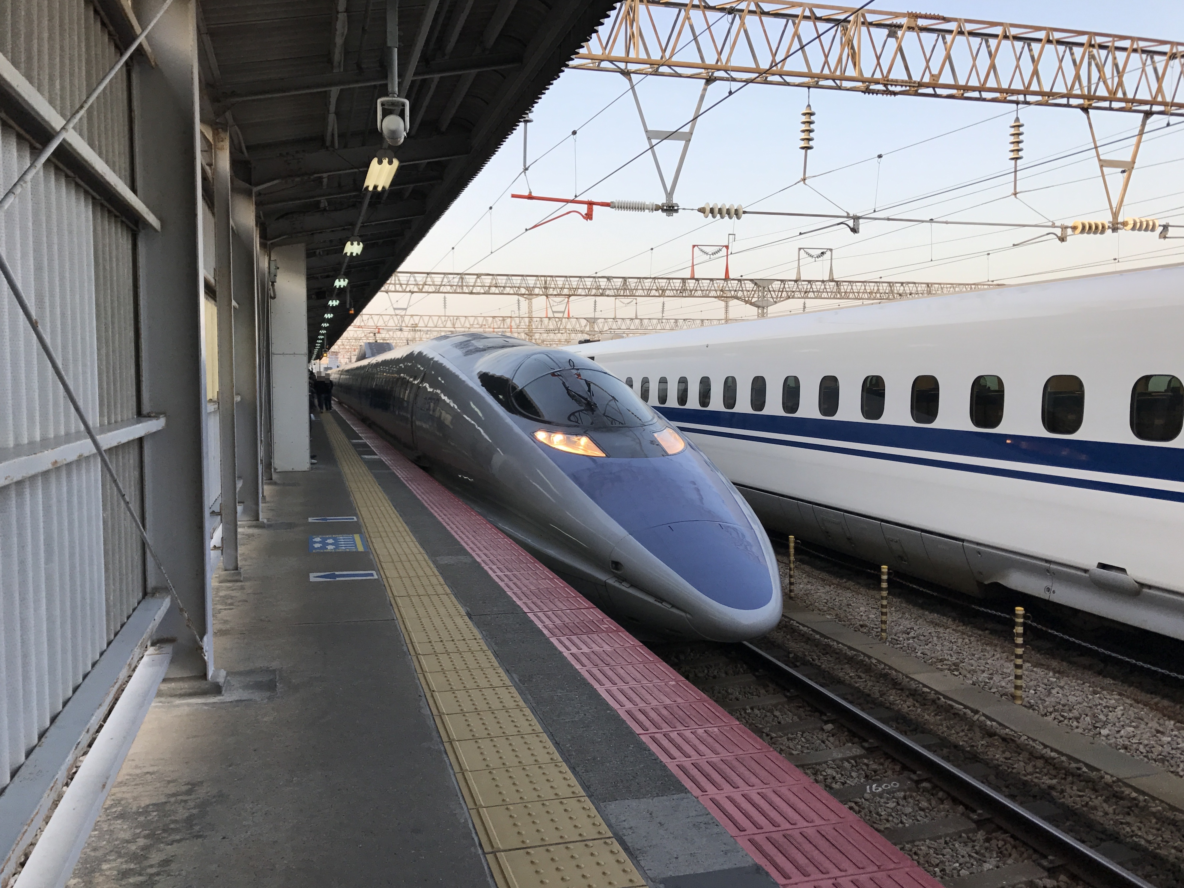 博多南駅に到着した博多南線列車